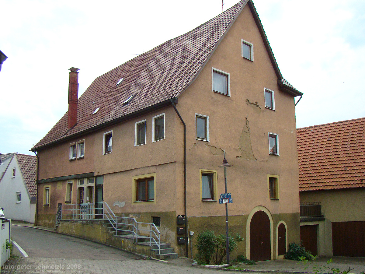 Gebäude Görresstr. 9/11 in Heilbronn-Sontheim mit hist. Weingärtnerkeller